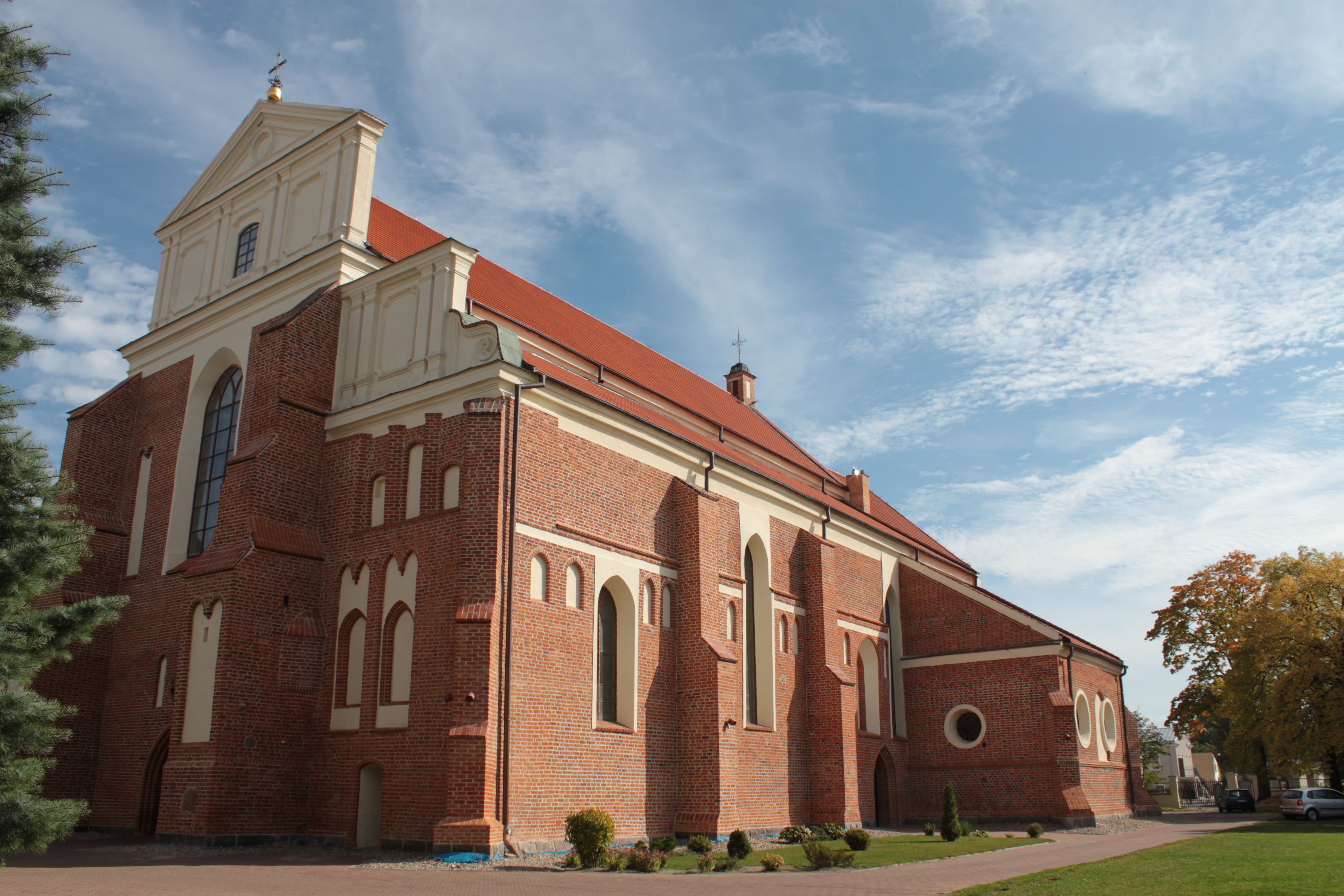 Łomża, ul. Dworna 25 - Katedra pw. św. Michała Archanioła, 1504-1525, kon. XVII, XIX